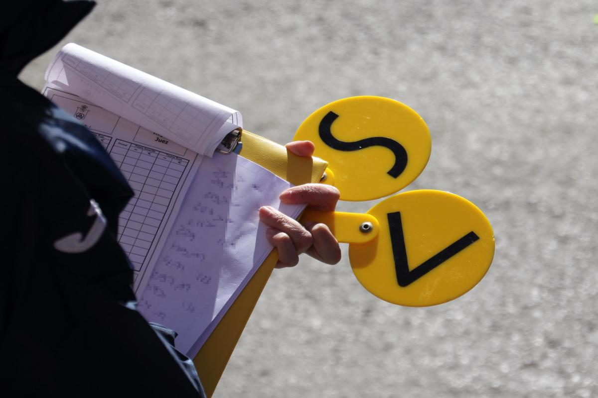 Palas de avisos utilizadas en el Campeonato de España de Marcha Atlética celebrado el 1 de marzo de 2015 en Jumilla (región de Murcia).